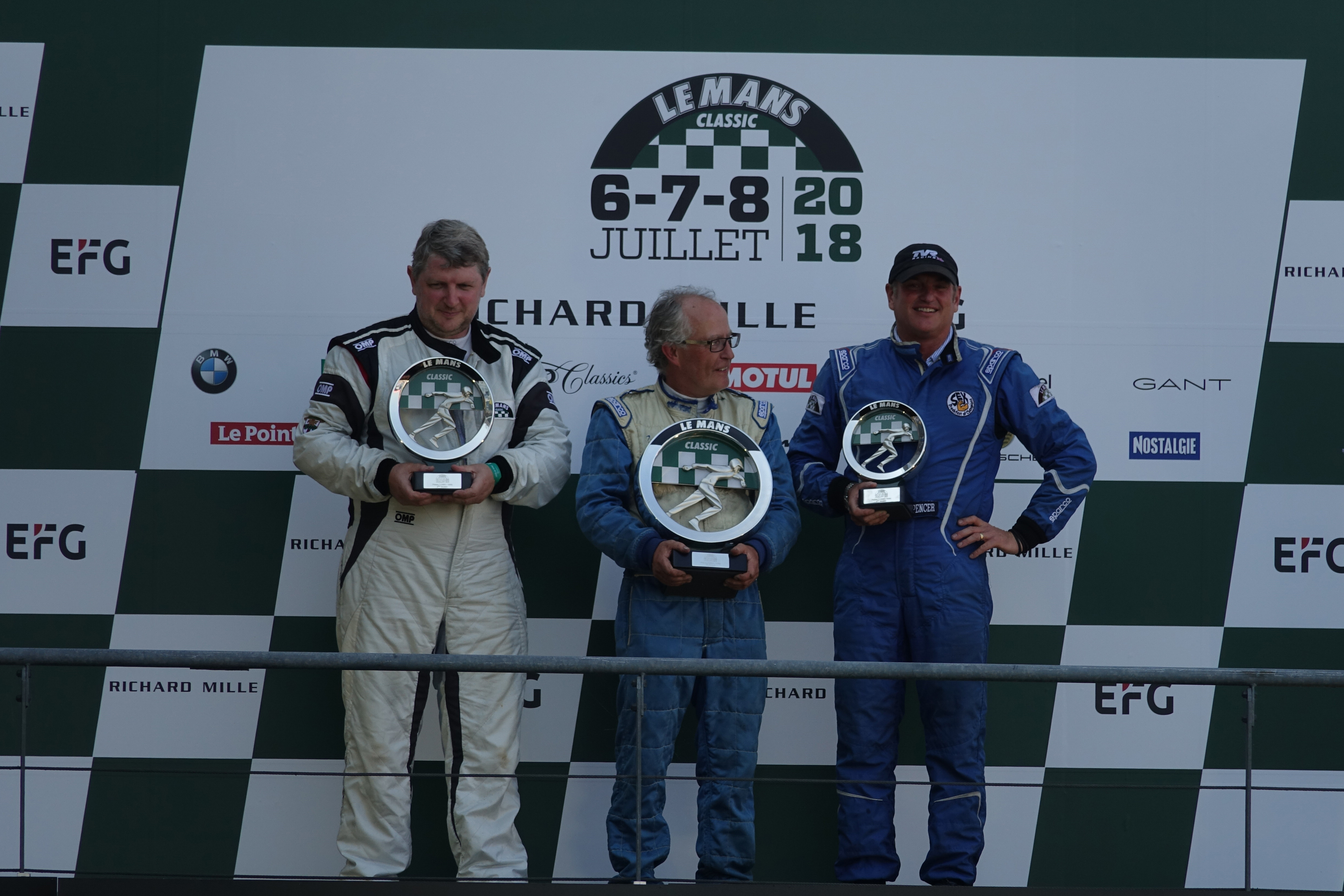 Vainqueurs du Plateau 1 au Le Mans Classic 2018